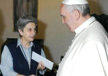 SuorRitaGiarettaPapaFrancesco